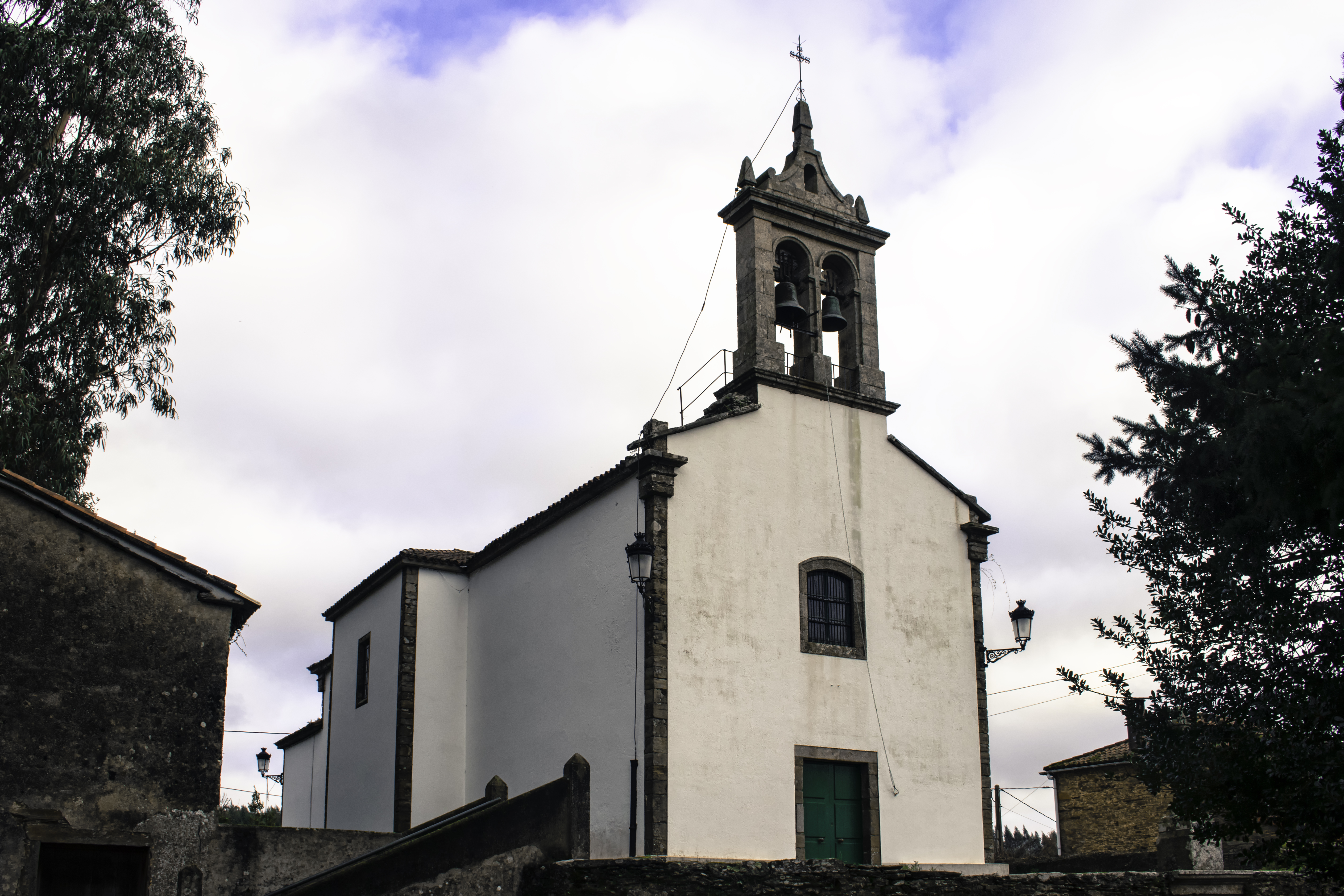 Igrexa de San Vicenzo do Pino, no concello coruñés do Pino.